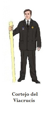 Hábito del Cortejo del Prendimiento